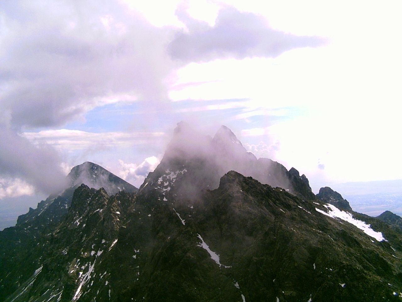 Staroleśny Szczyt skrywający się za chmurami